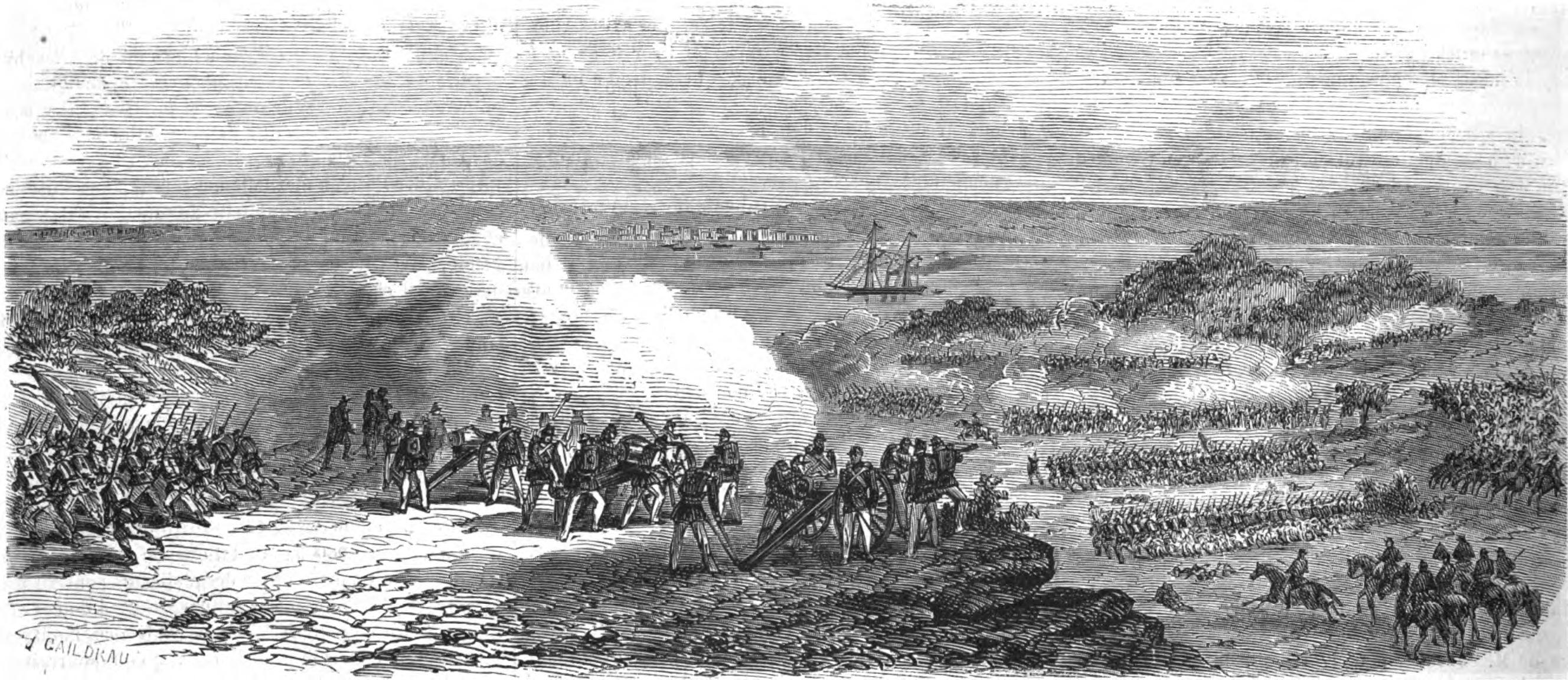 Combat Du Yatay (rive droit de l'Uruguay). Gapné par l'avant-garde des alliés, sous les ordres du général Florès, sur la division paraguayenne du général Duarte (17 août 1865). - D'aprés un croquis de M. Maximo Alvés.